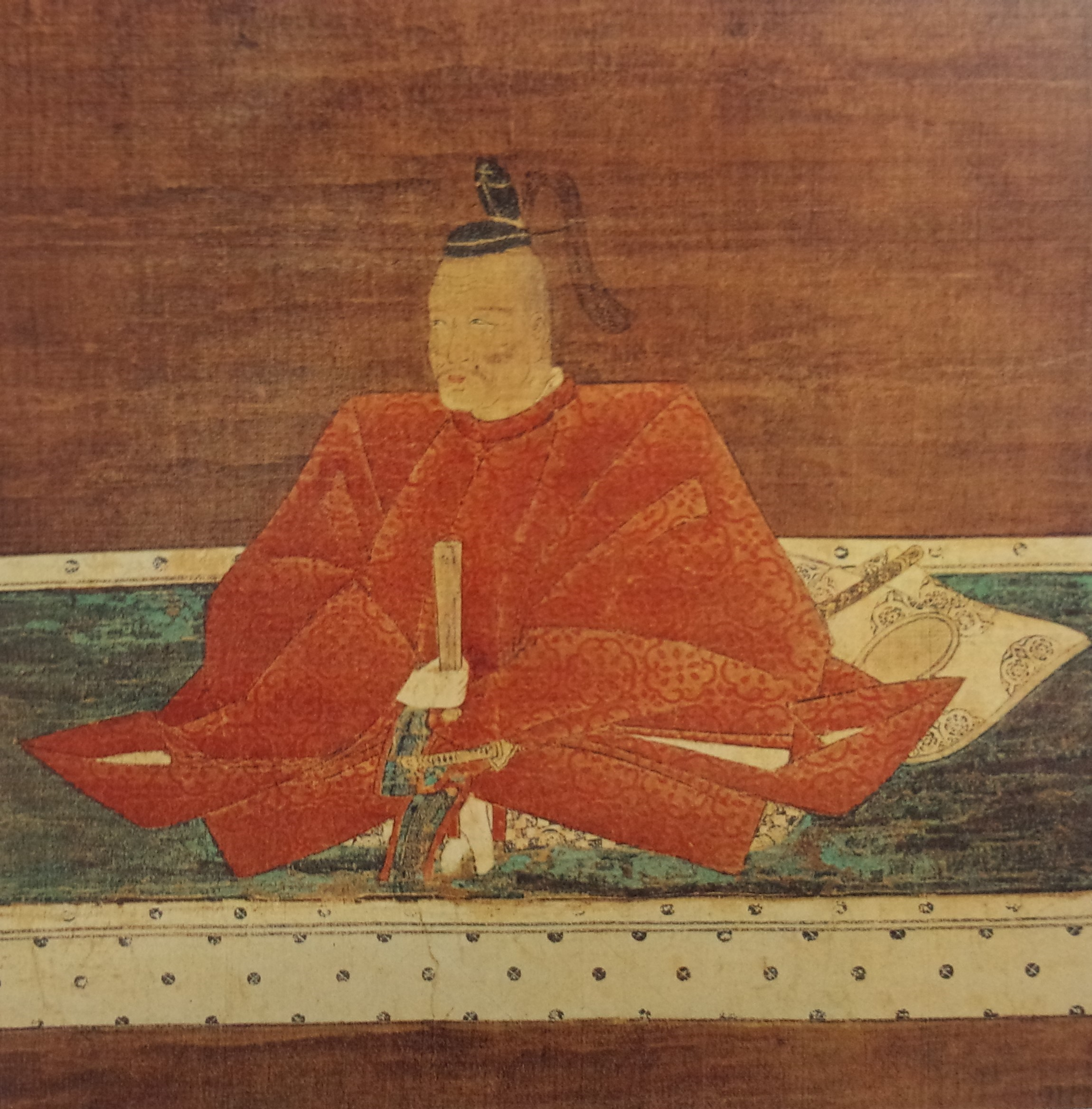 滝川忠征の肖像。